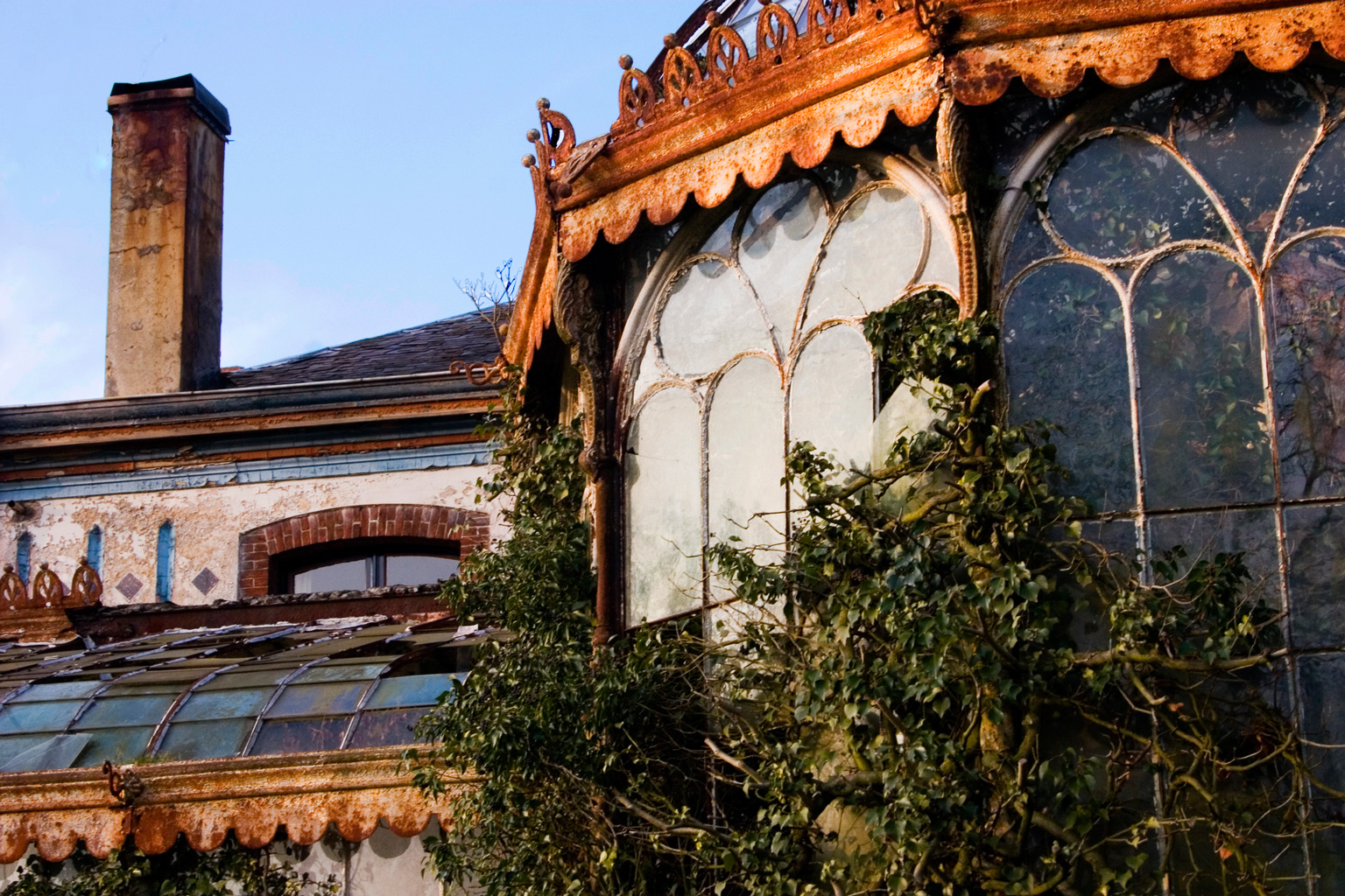 Detailopname van de serres van Kasteel Ter Borght of Nieuw Hof, te Westmeerbeek. Het classicistische kasteel werd gebouwd in 1780.